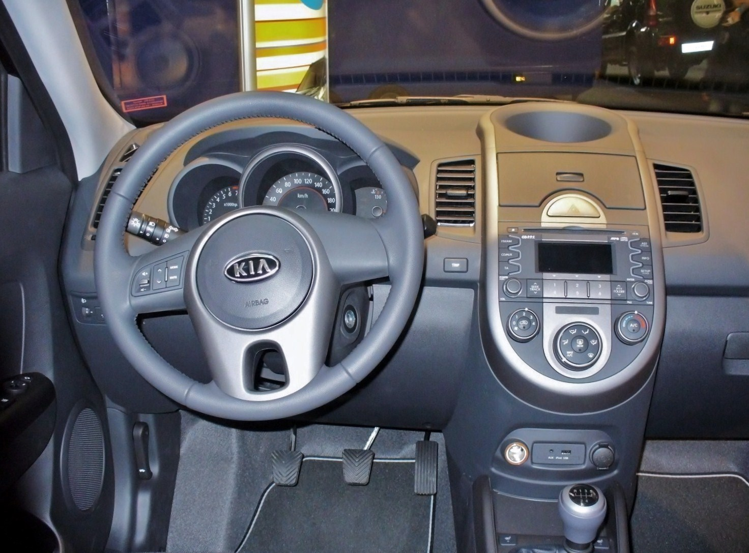 Kia Soul Interieur